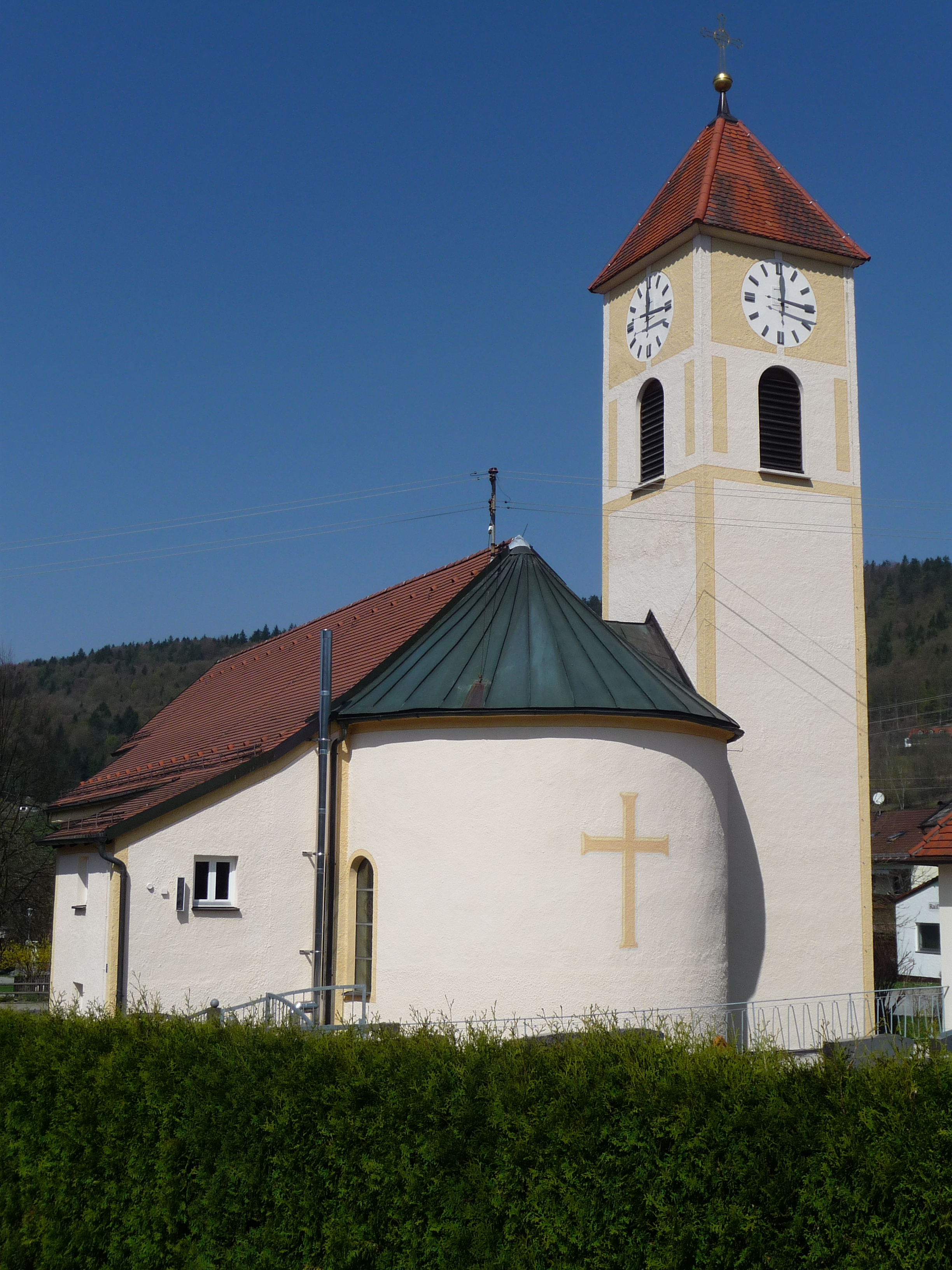 Die katholische Expositurkirche Hl. Herz Jesu in Hunding